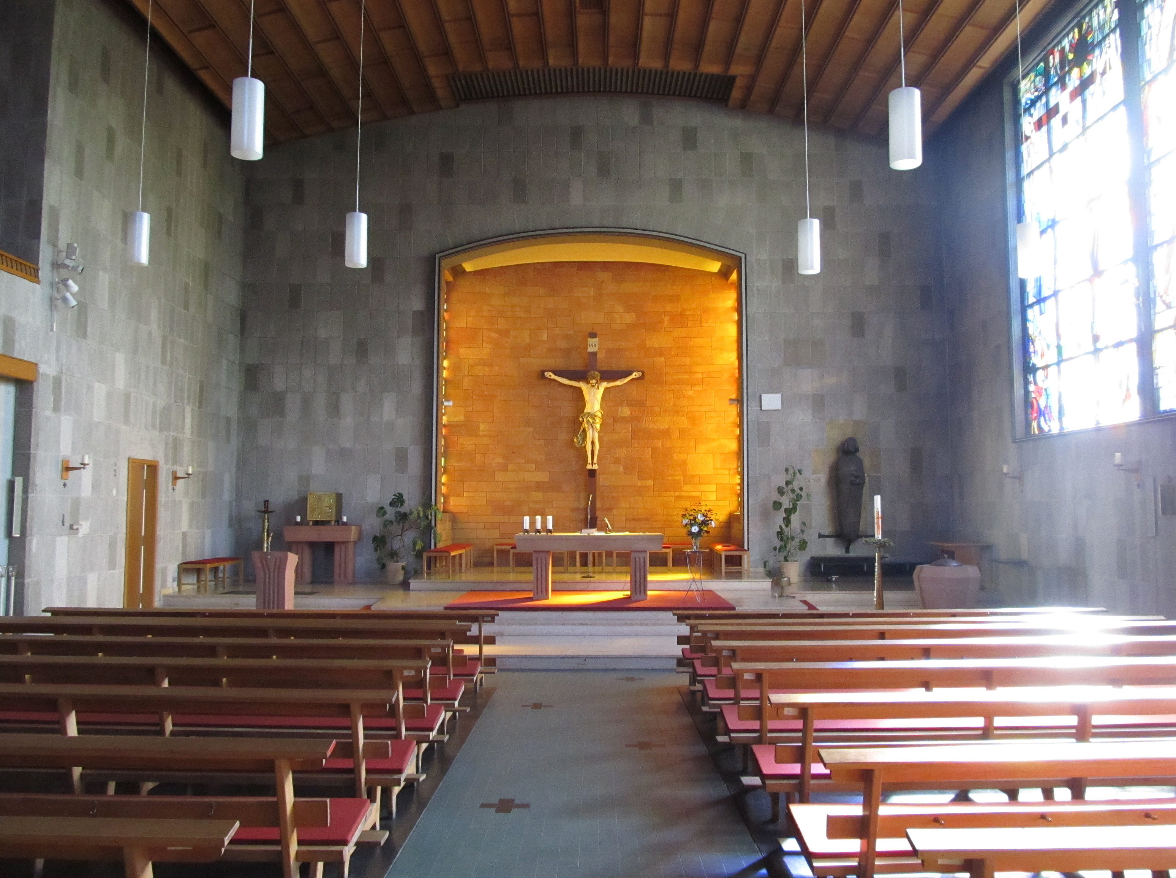 Blick ins Innere der katholischen Kirche St. Remigius in Homburg-Beeden, Saarland